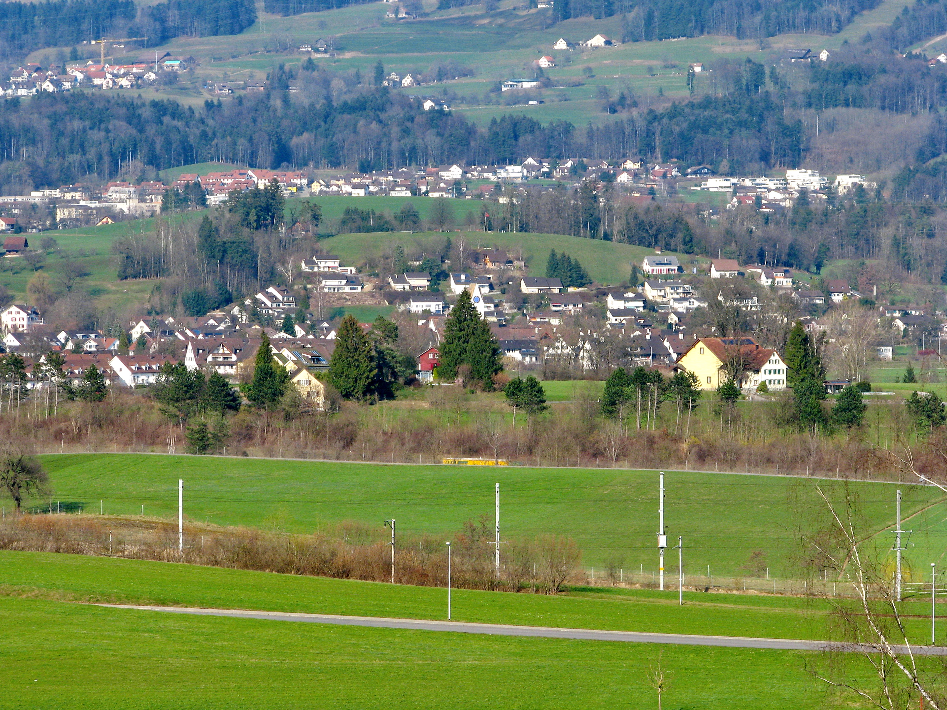 Dürnten (Switzerland) as seen from Bubikon